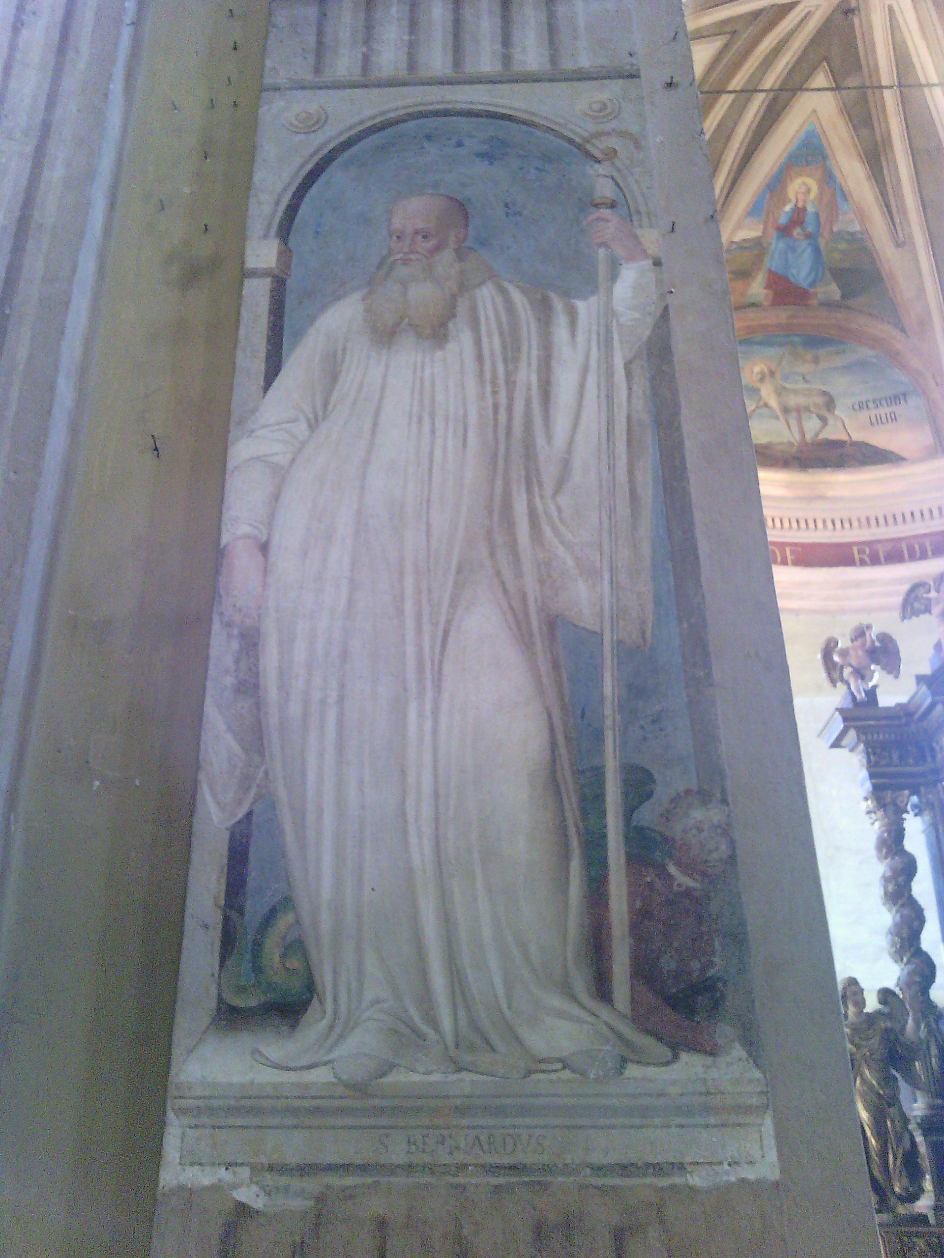 Santuario della Madonna Addolorata e di San Bernardo a Mesero (MI) - Italia. Particolare dell'affresco rappresentante San Bernado